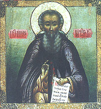 Преподобный Макарий Унженский, икона, предположительно XVIII век. Автор неизвестен.